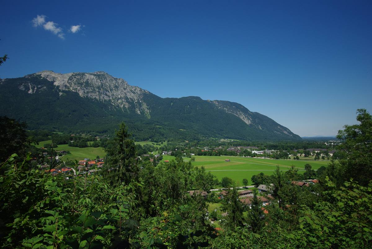 Blick von der Amalienruhe in 83435 Bad Reichenhall auf Karlstein, die Weitwiese, den Staufen und den Fuderheuberg